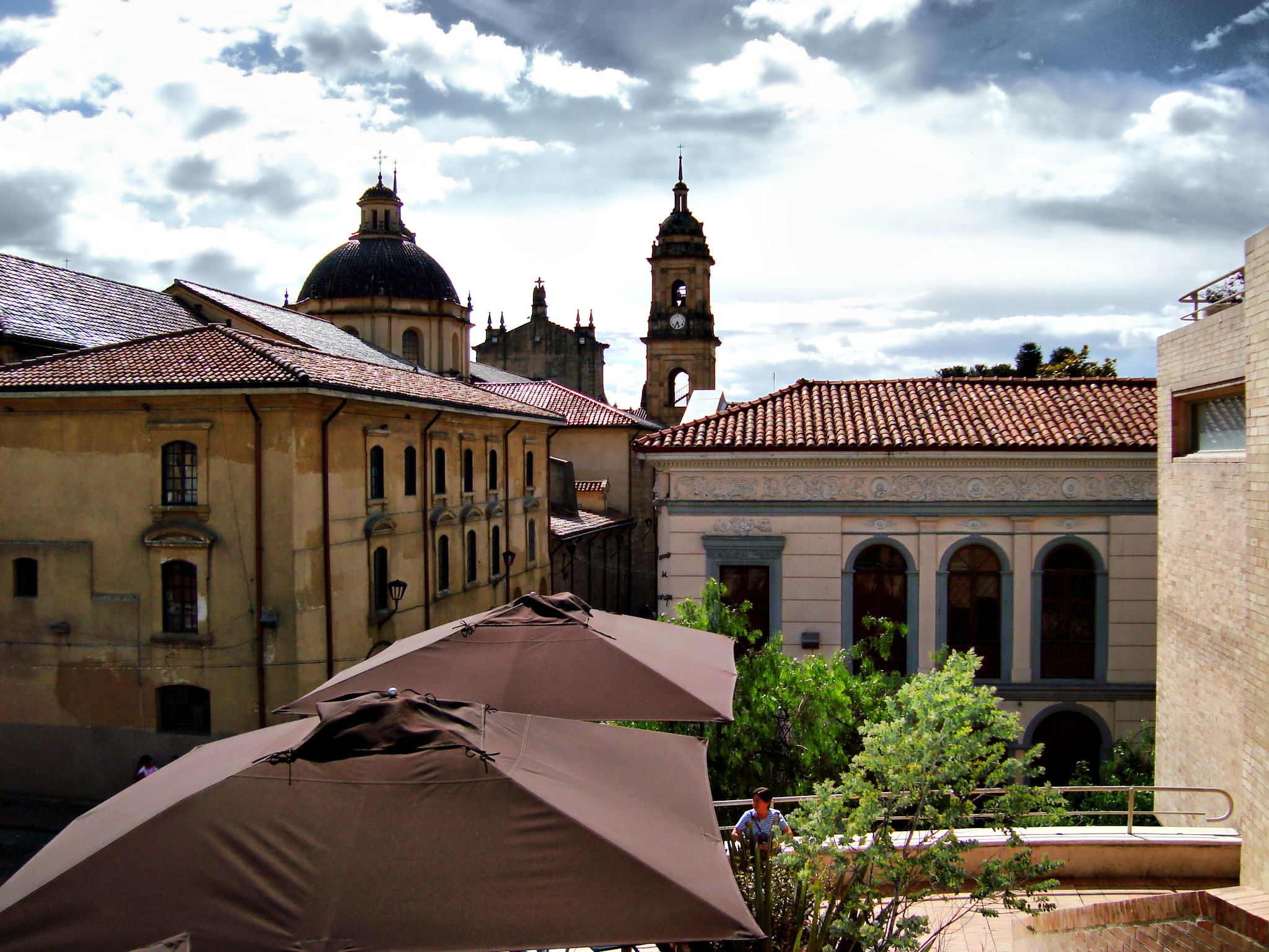 Casa Cural de la Catedral